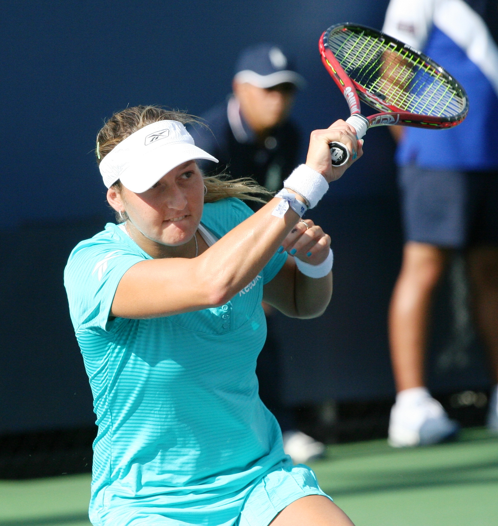 U.S. Open, Saturday, Sept. 4, 2010